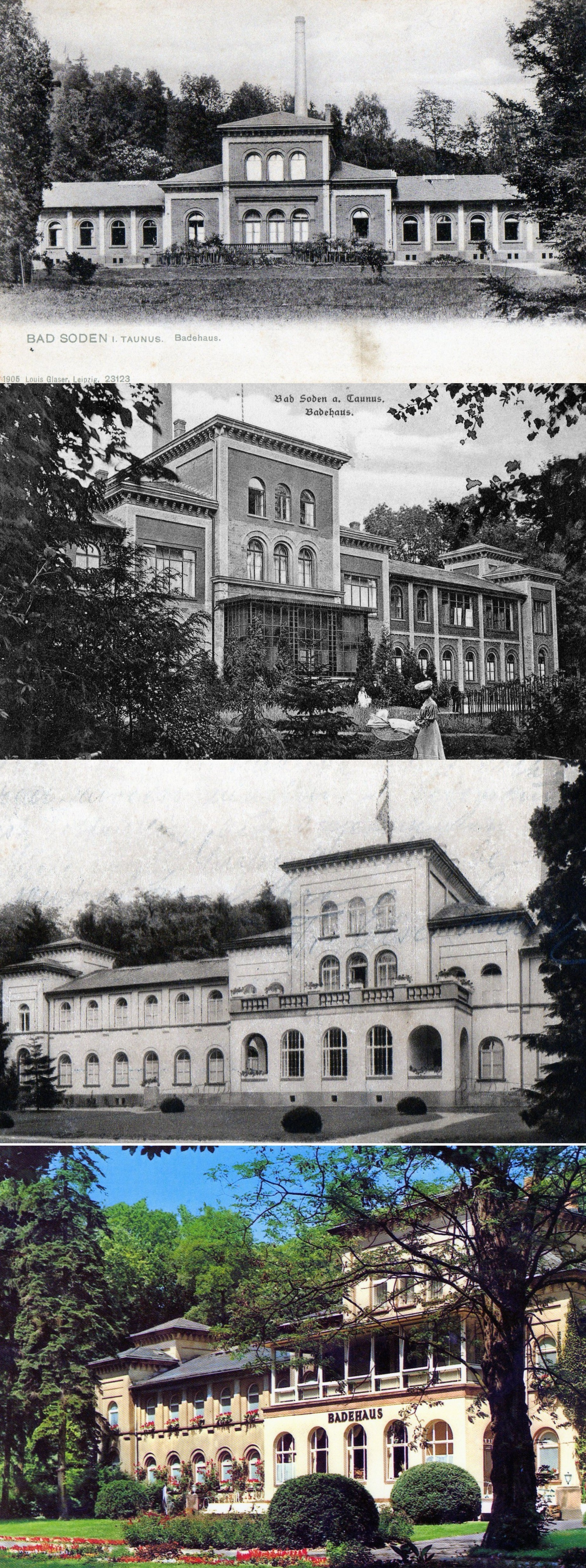 (1) um 1898 (2) 1908 (3) 1918 (4) 1970